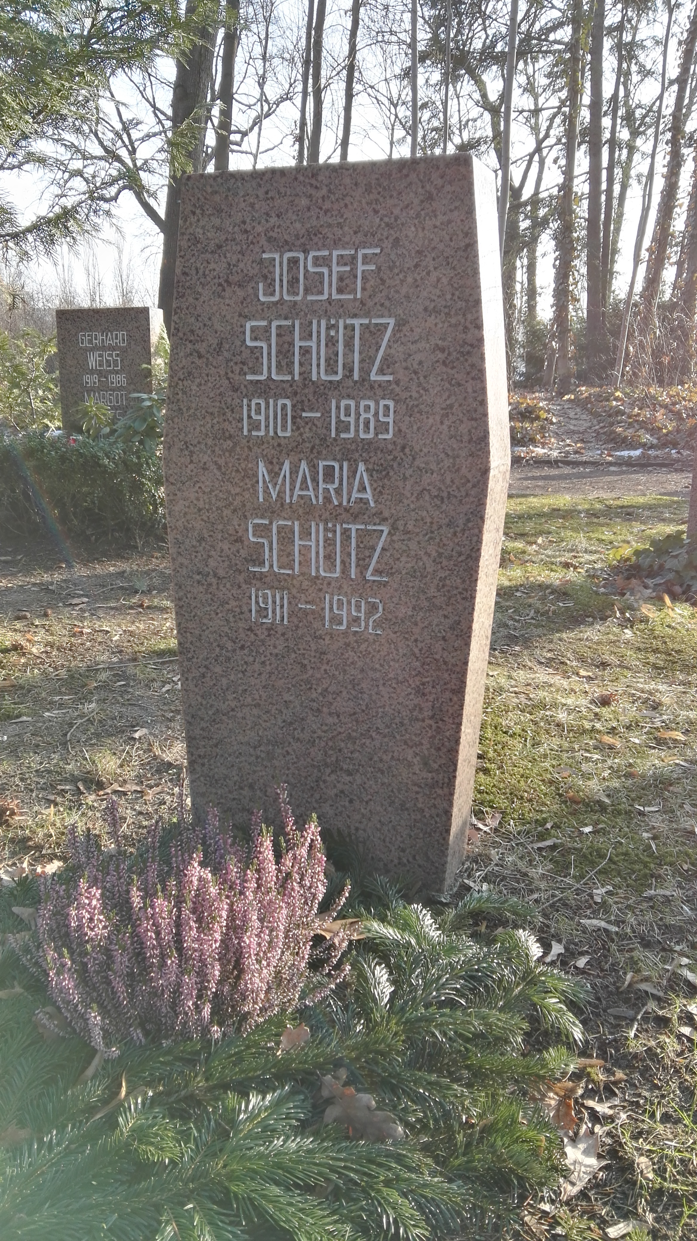 Grab von Josef Schütz und Maria Schütz auf dem Sozialistenfriedhof des Zentralfriedhofs Friedrichsfelde